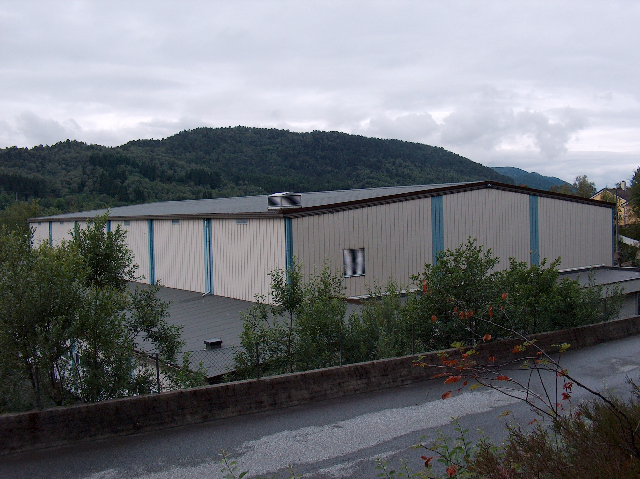 Bjørnarhallen